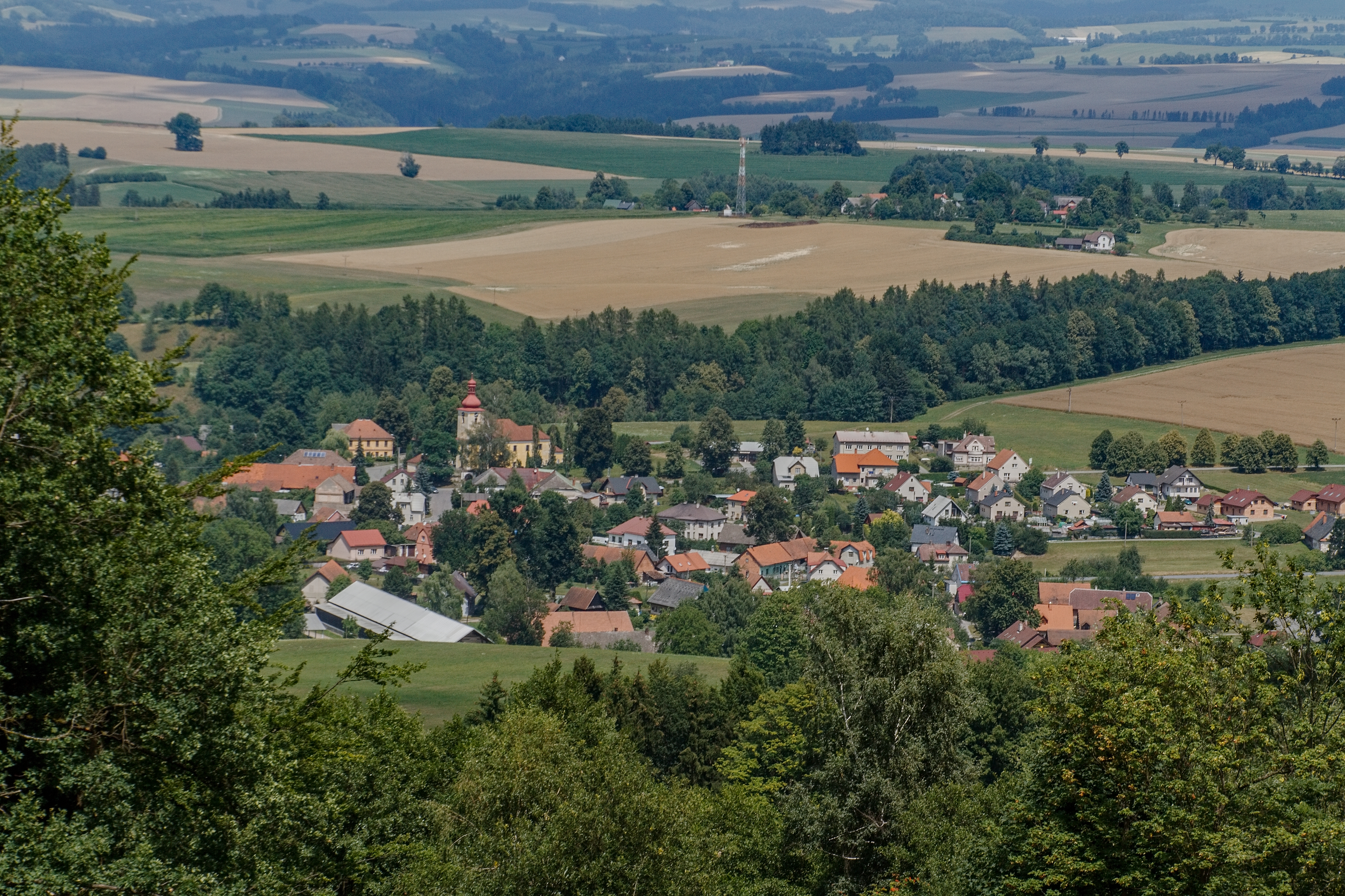 Rybná nad Zdobnicí ze stráně od Chlumu